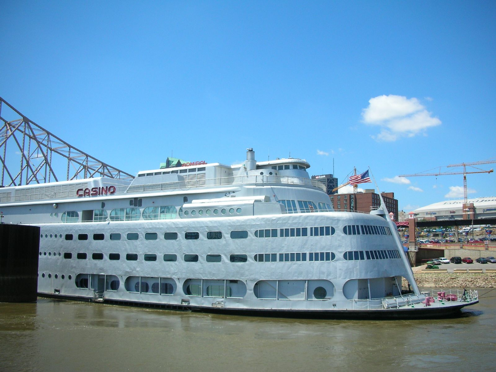 SS Admiral